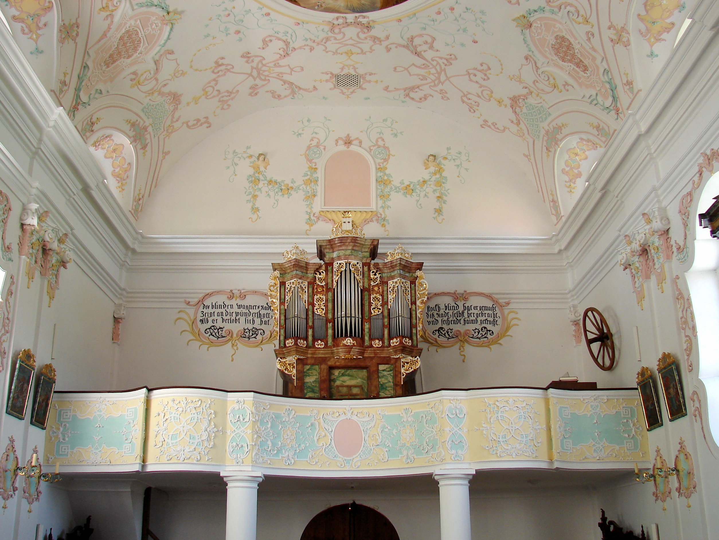 Die Empore der in Niederbayern gewiß nicht unbekannten Wallfahrtskirche Hellring enthält ein herrliches Barock-Orgelgehäuse. Einen Klang aus diesem Orgelgehäuse haben bisher nur wenige gehört, da die Orgel zuletzt völlig unspielbar war. In der Fachwelt hat die Orgel daher auch kaum Beachtung gefunden. Sie hätte wohl auch weiterhin ihren Dämmerschlaf fortgesetzt, wenn nicht die Wallfahrtskirche am Rande der Einsturzgefahr in letzter Minute gerettet worden wäre. In das Sanierungskonzept wurde dabei auch eine Wiederspielbarmachung der Orgel eingeplant. Die Orgel fertigte wahrscheinlich um 1740, der in Stadtamhof bei Regensburg ansässige Orgelbauer Johann Konrad Brandenstein (1695-1757)